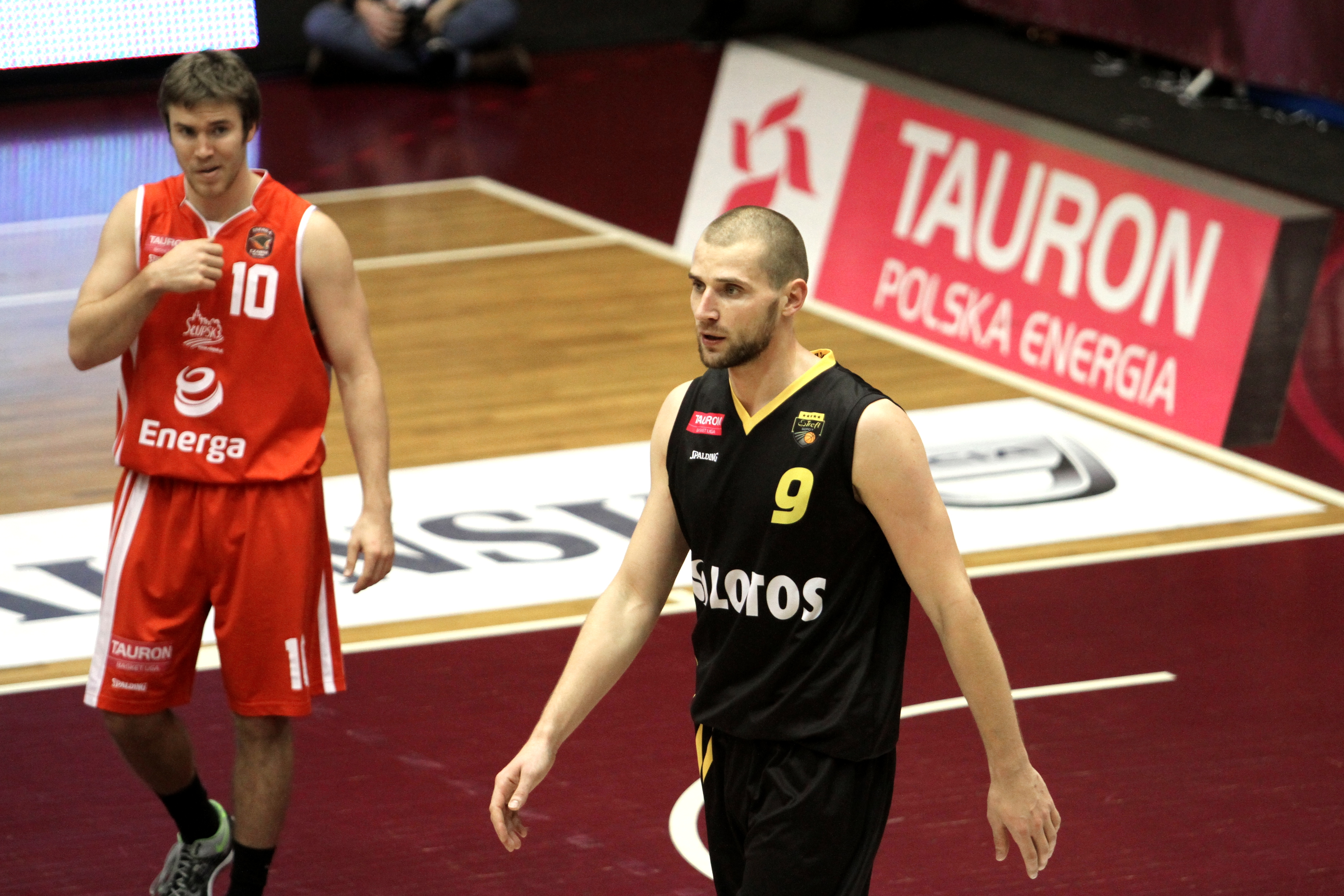 Paweł Leończyk, Treﬂ Sopot